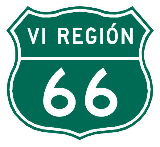 Escudo de la Ruta CH-66